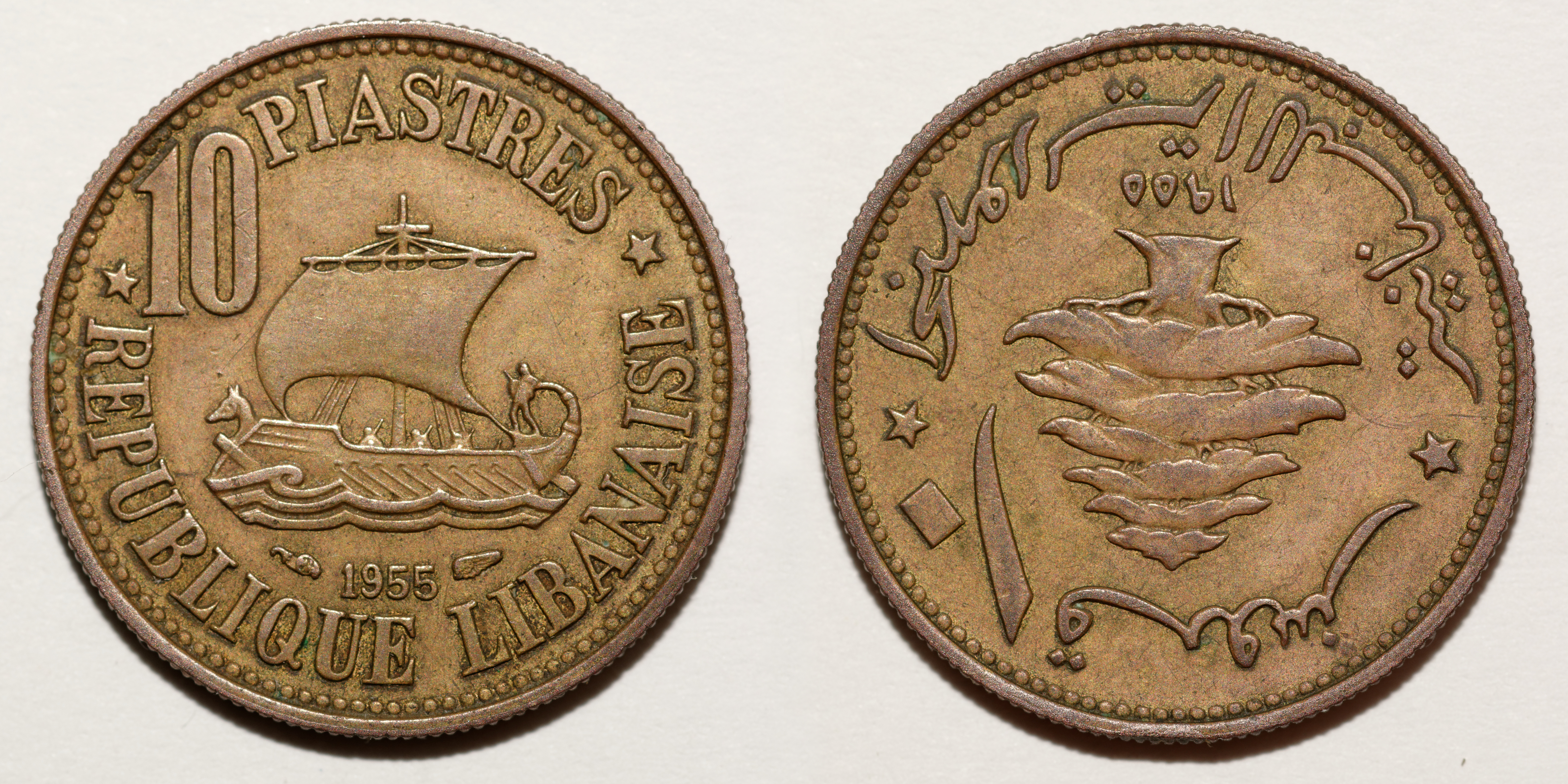 Pièce. Axe : frappe monnaie. Avers (à droite) : effigie : cèdre Revers (à gauche) : valeur faciale : 10 Piastres (10 centièmes de Livre libanaise) légende : REPUBLIQUE LIBANAISE différent : corne d'abondance ; graveur général : Lucien Bazor (aile d'oiseau) millésime : 1955